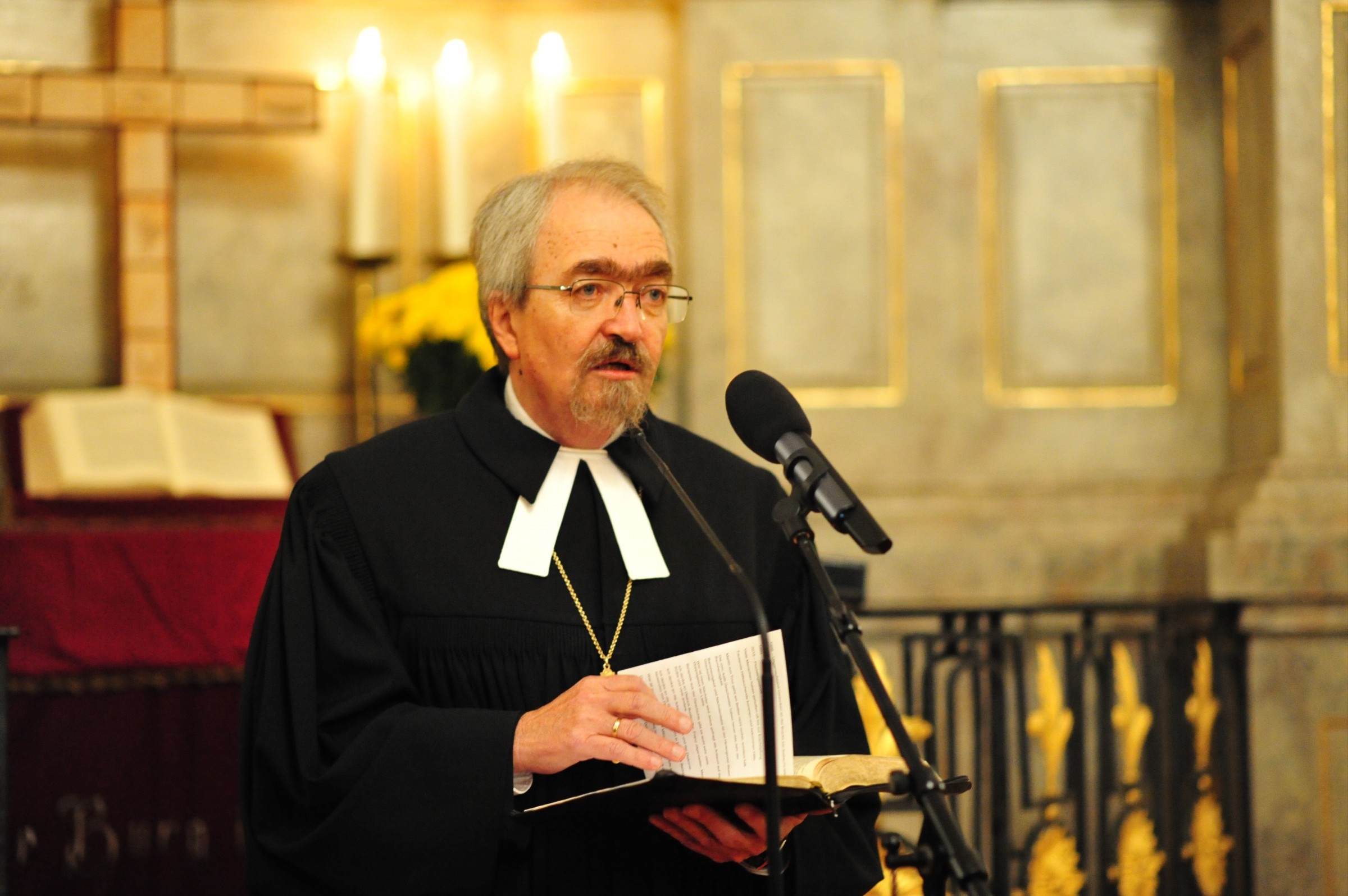 Der burgenländische Superintendent Manfred Koch beim Ökumenischen Gottesdienst in der evangelischen Kirche in Rust.